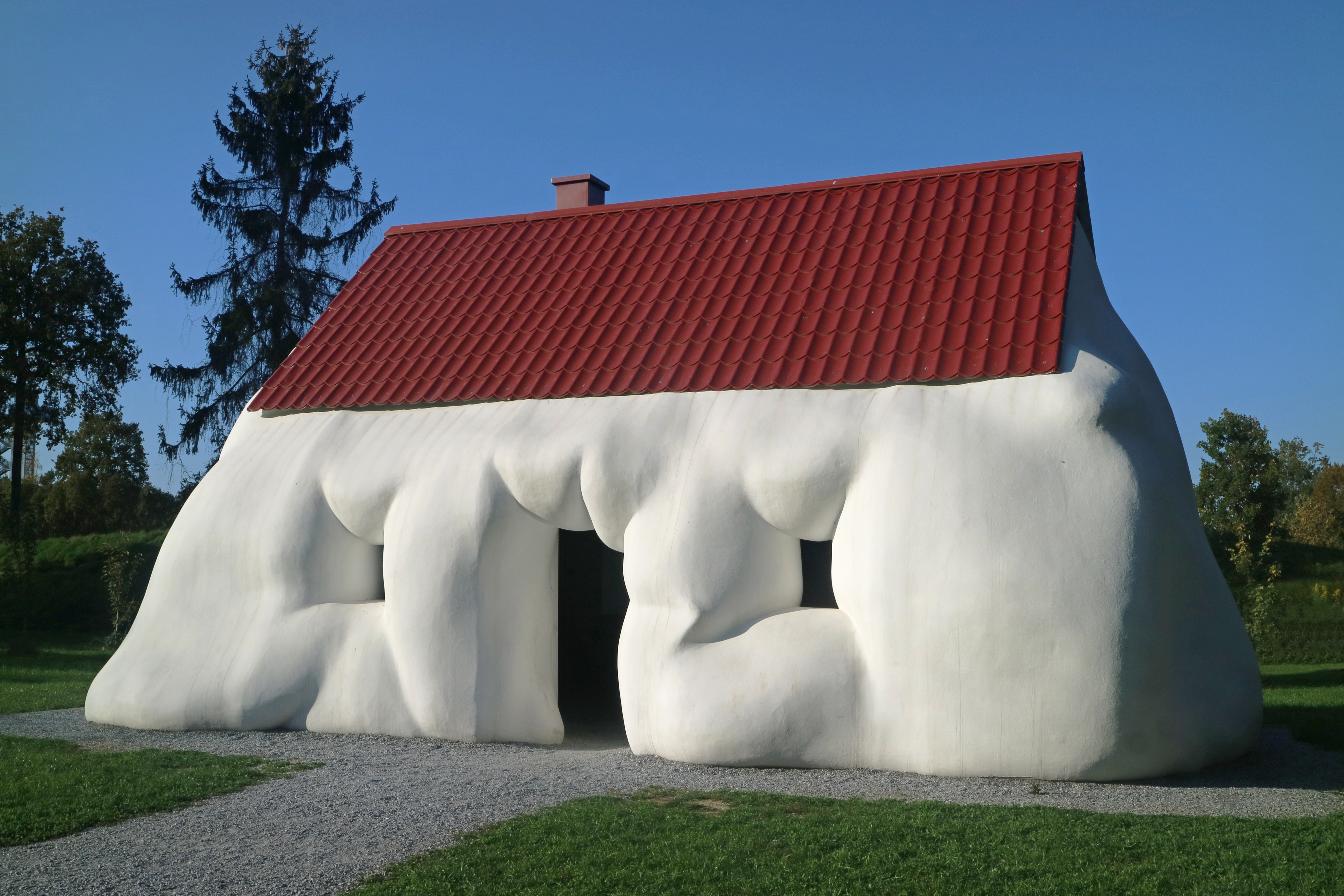 Erwin Wurm: Fat House (2003) im Österreichischen Skulpturenpark in der Gemeinde Premstätten, Steiermark